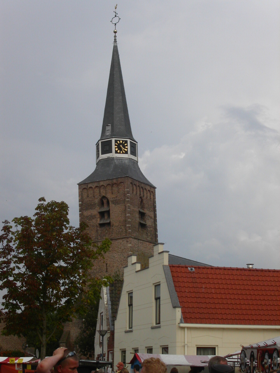 Hervormde Kerk van Zuidland, Gemeente Bernisse (St Bartholomeüs). Gebouwd in de 15de eeuw. In 1918 gedeeltelijk door brand verwoest